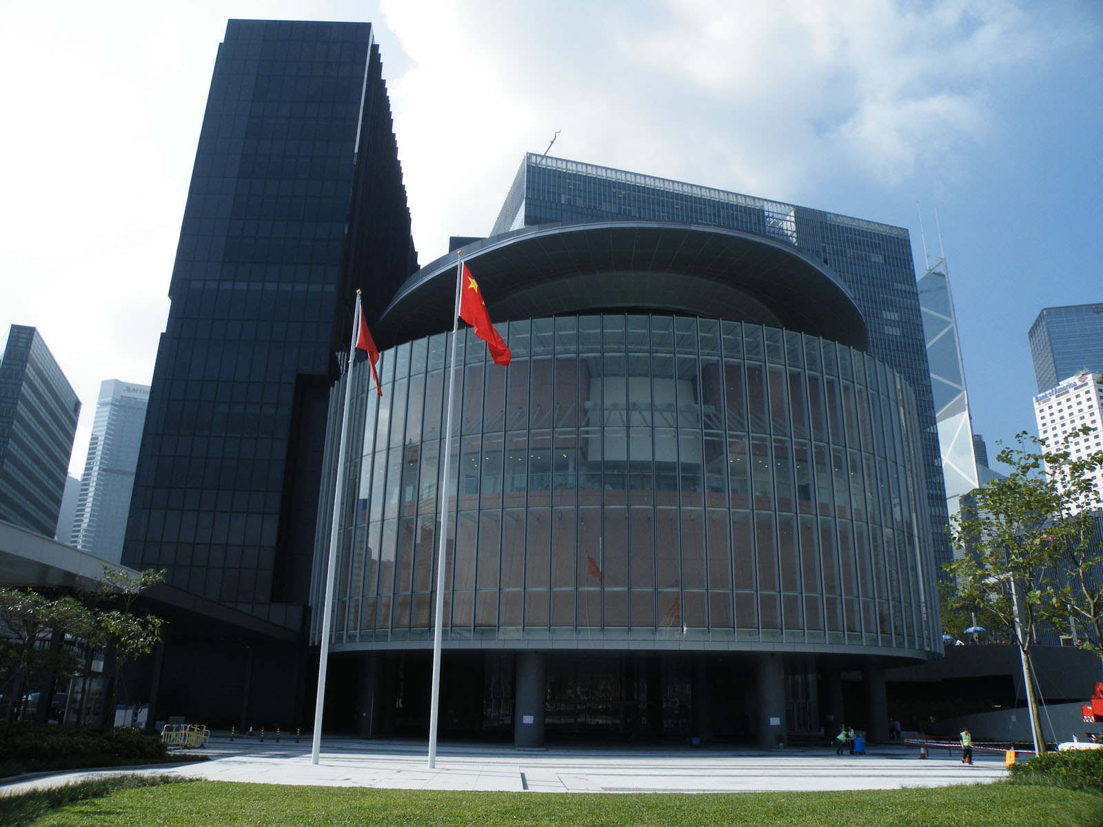 LEGCO Complex